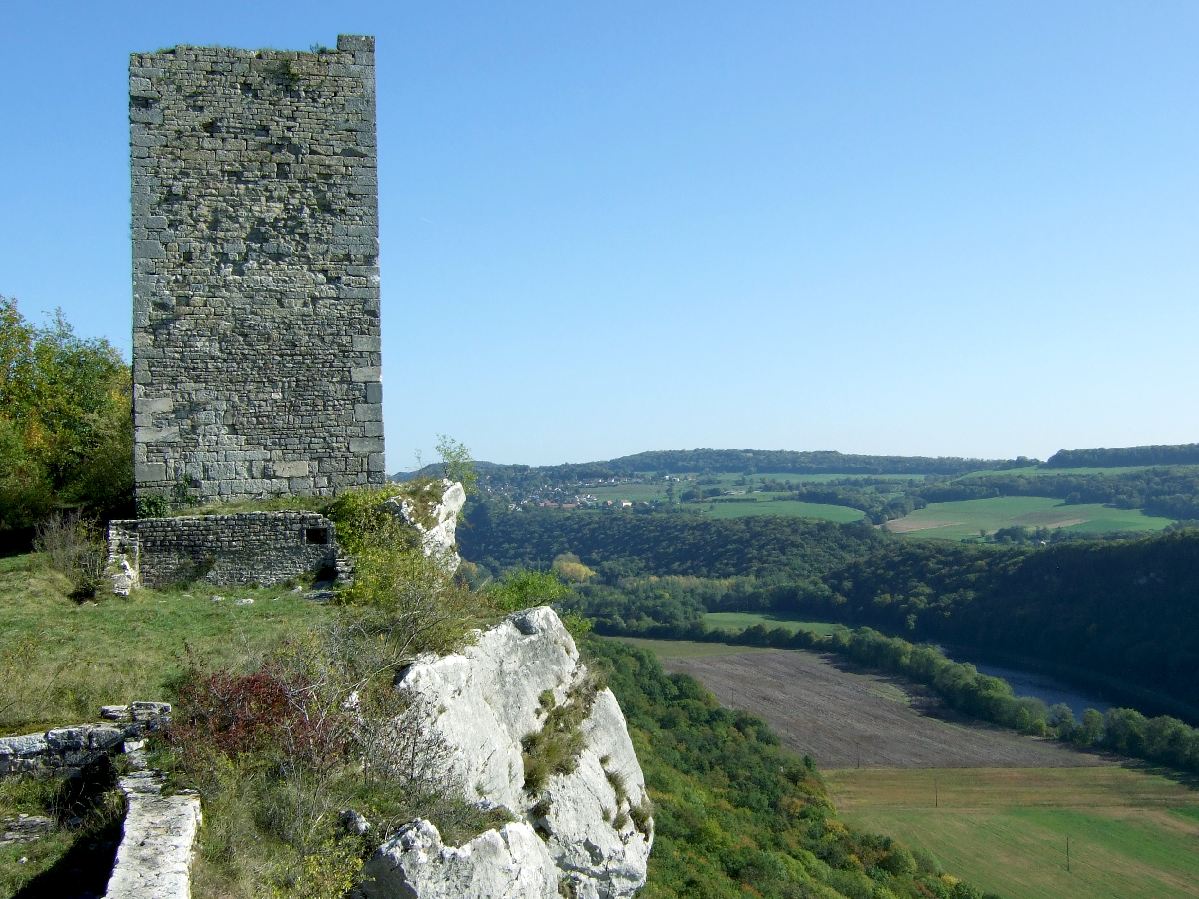 Château de Montferrand-le-Château (donjon/tour)